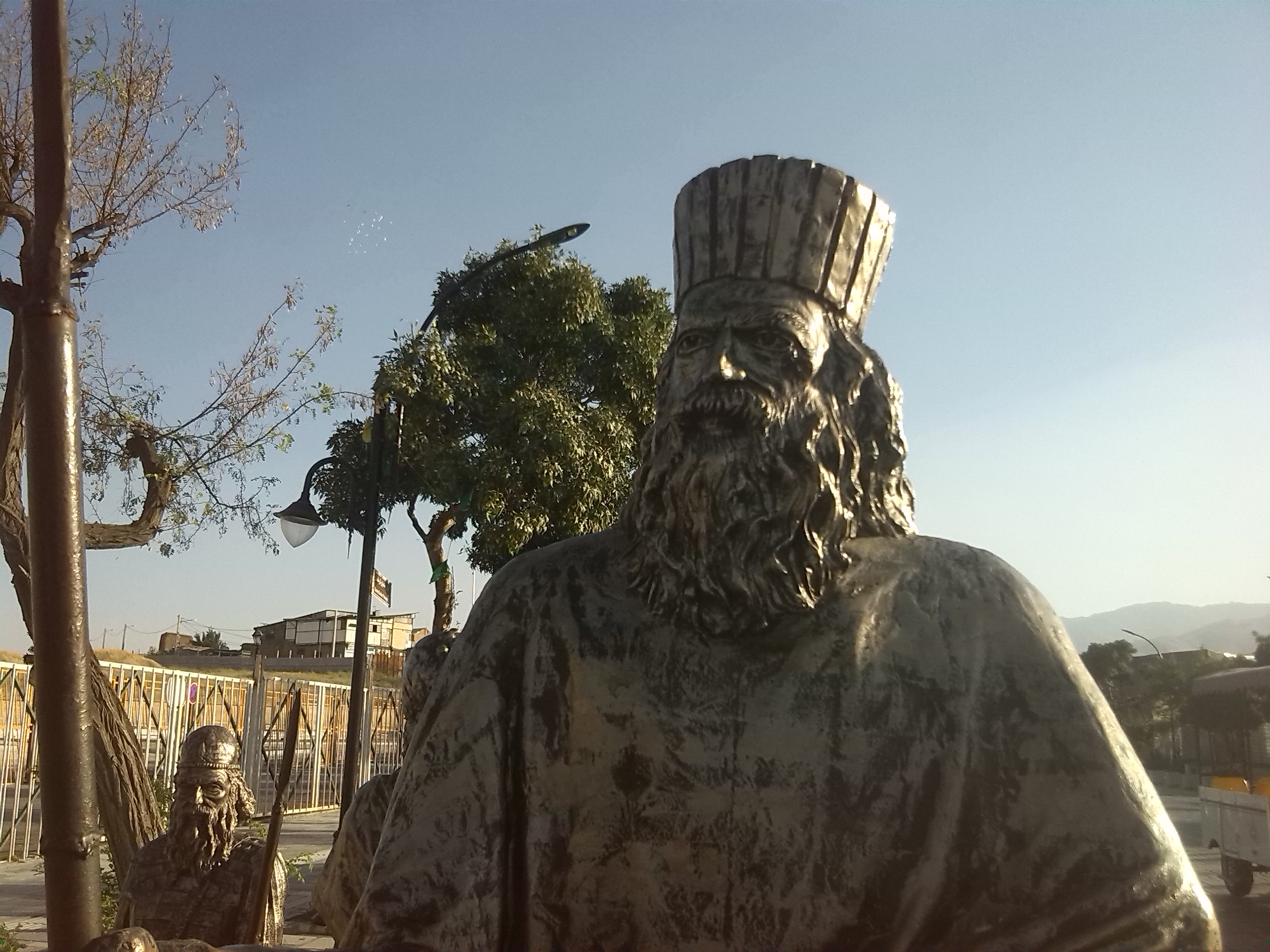 تندیس برنزی از شاه ماد یا پارس و همراهان، نصب شده در محوطه باستان شهر اکباتان یا همدان امروزی